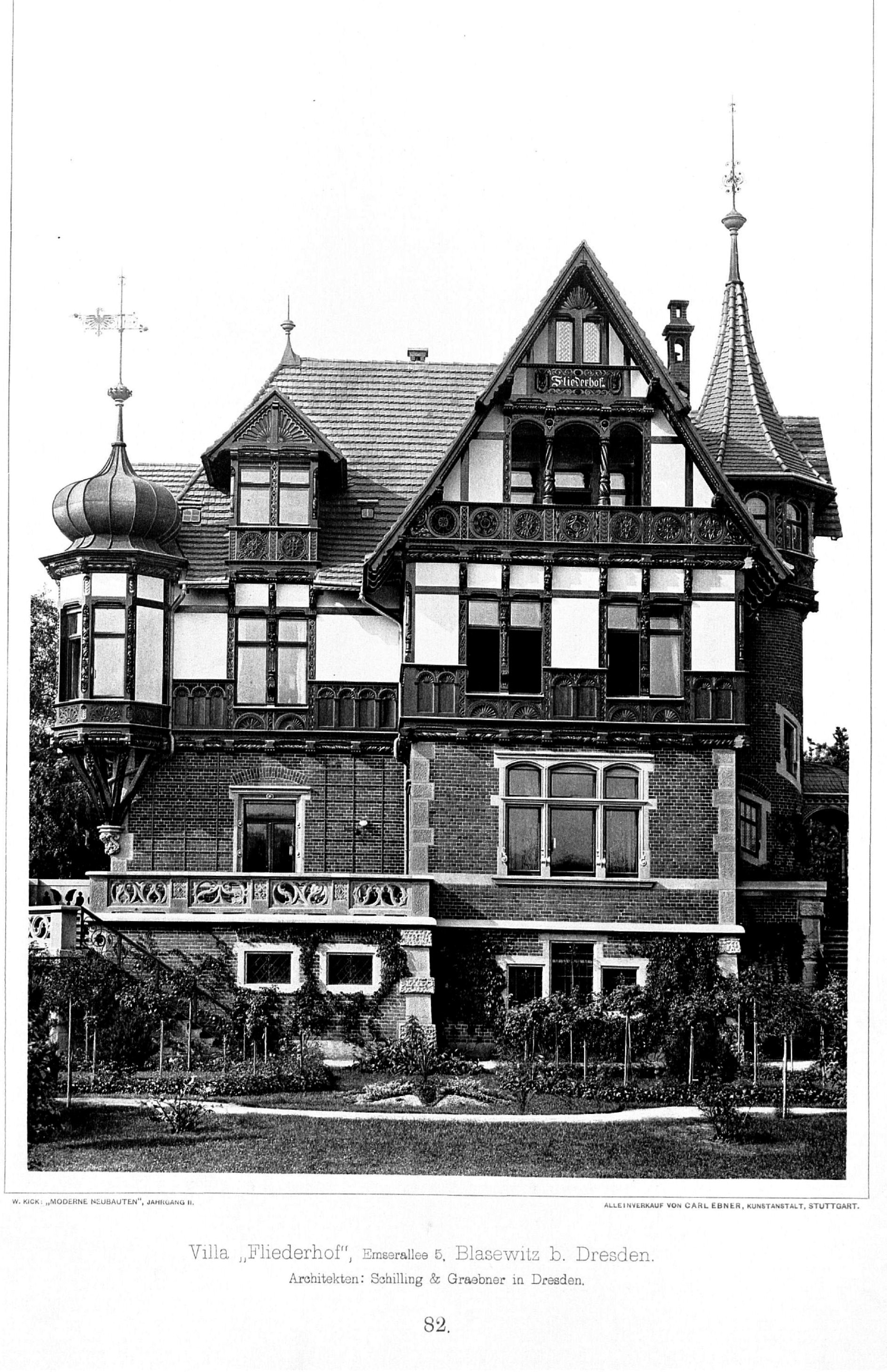 Villa Fliederhof, Emserallee 5, Blasewitz bei Dresden, Architekt Schilling & Graebner in Dresden, Tafel 82, Kick Jahrgang II.